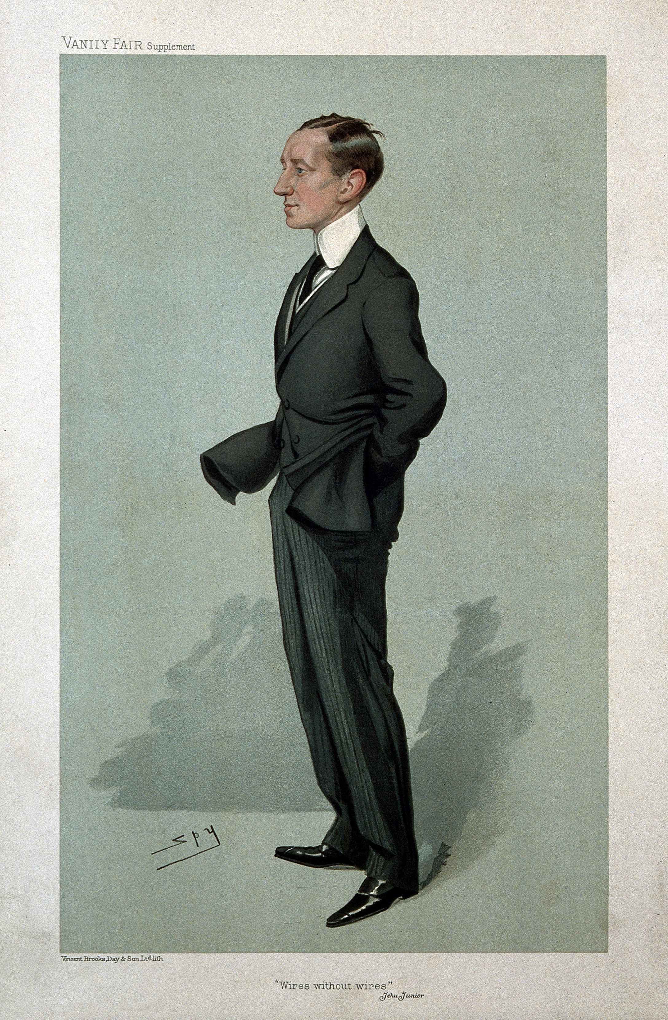 Genre/Technique: Portrait prints. Lithographs. Subject name: Marconi, Guglielmo, 1874-1937.